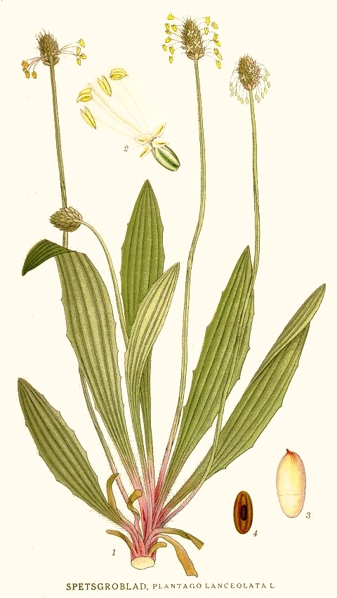 Plantago lanceolata